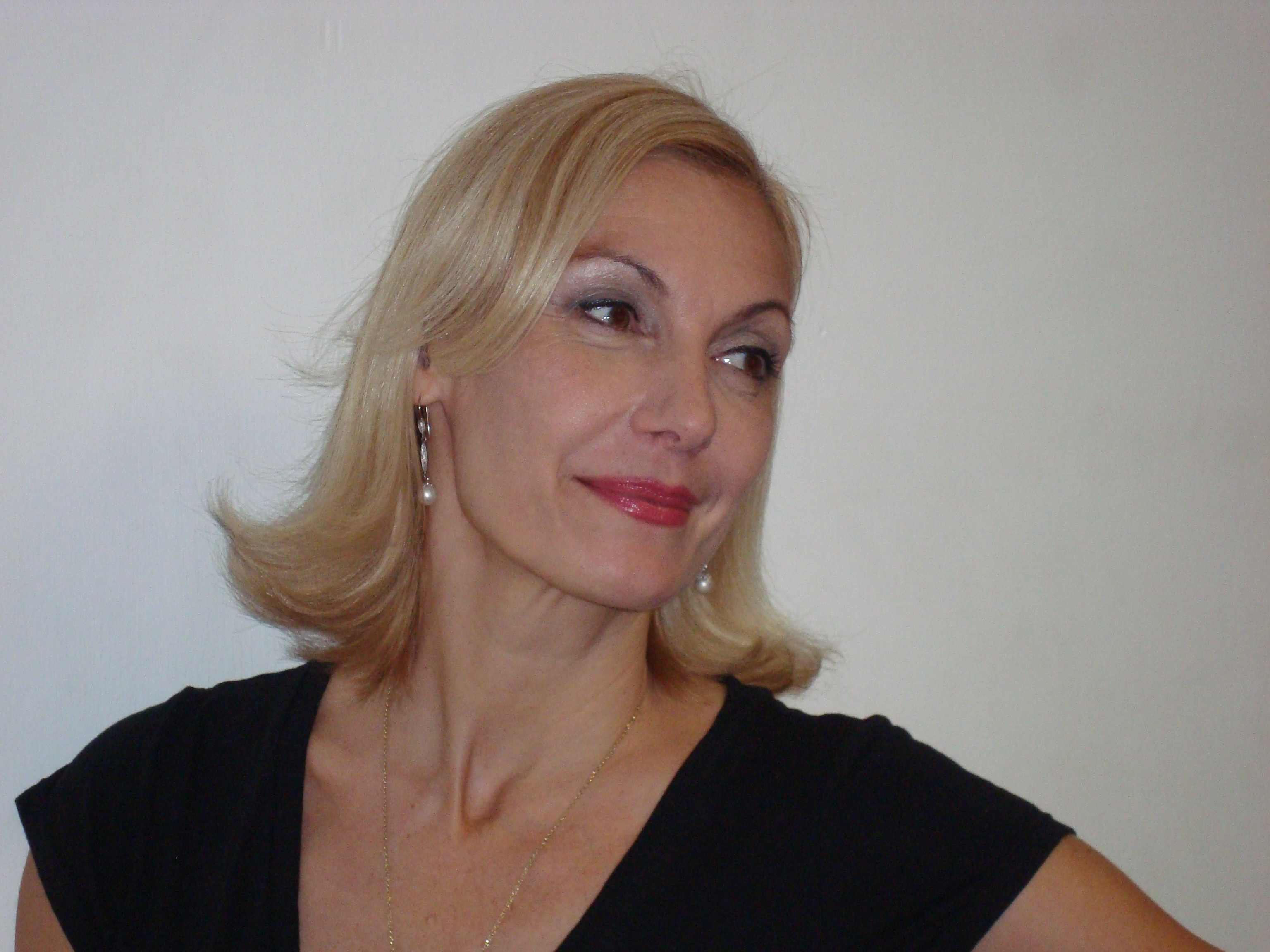 Ute Lemper en el salón de ensayos del Teatro Diana de Guadalajara, luego de su Berlin Cabaret Show.